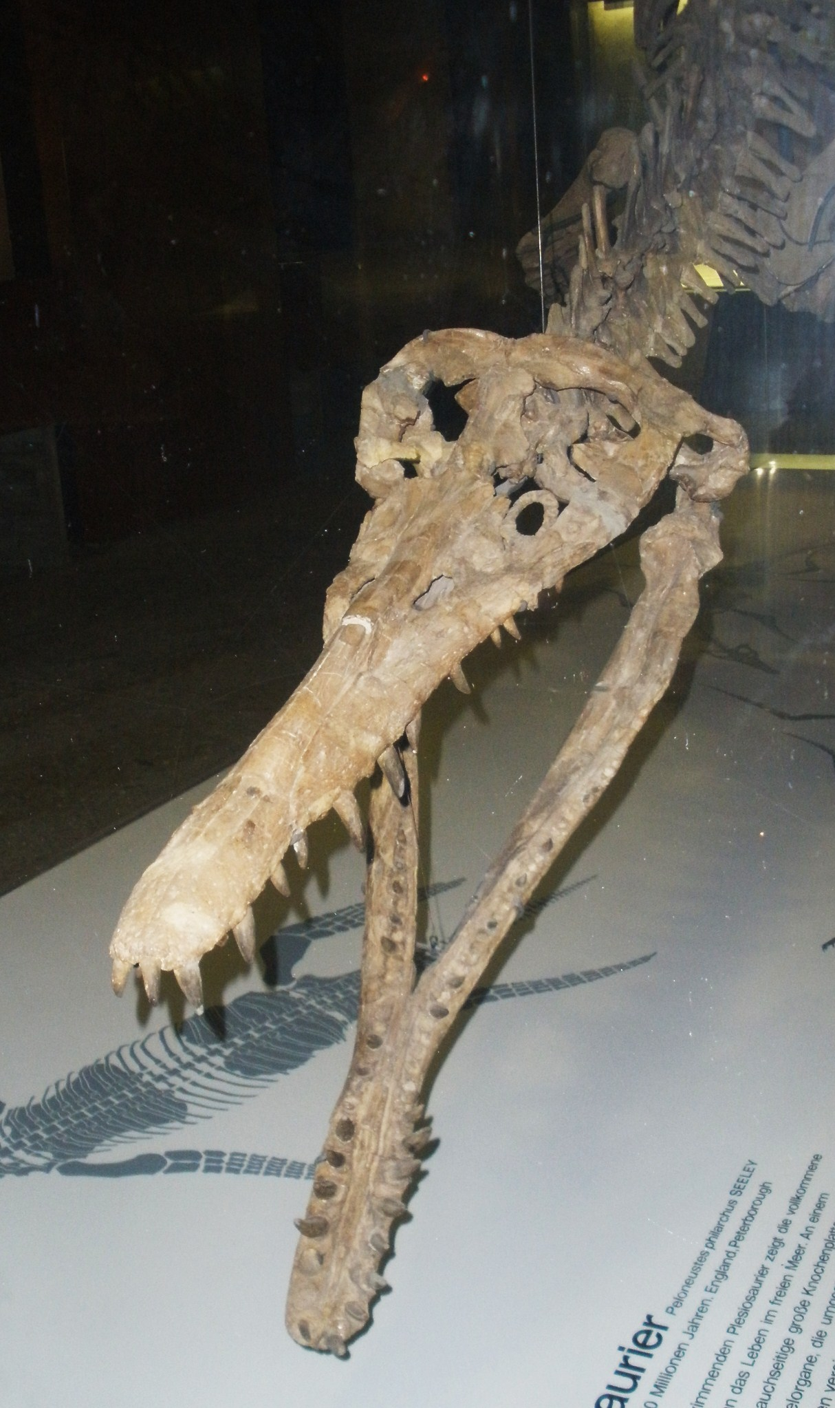 Fossil of Peloneustes, an extinct pliosaur- Took the photo at Senckenberg Museum of Frankfurt